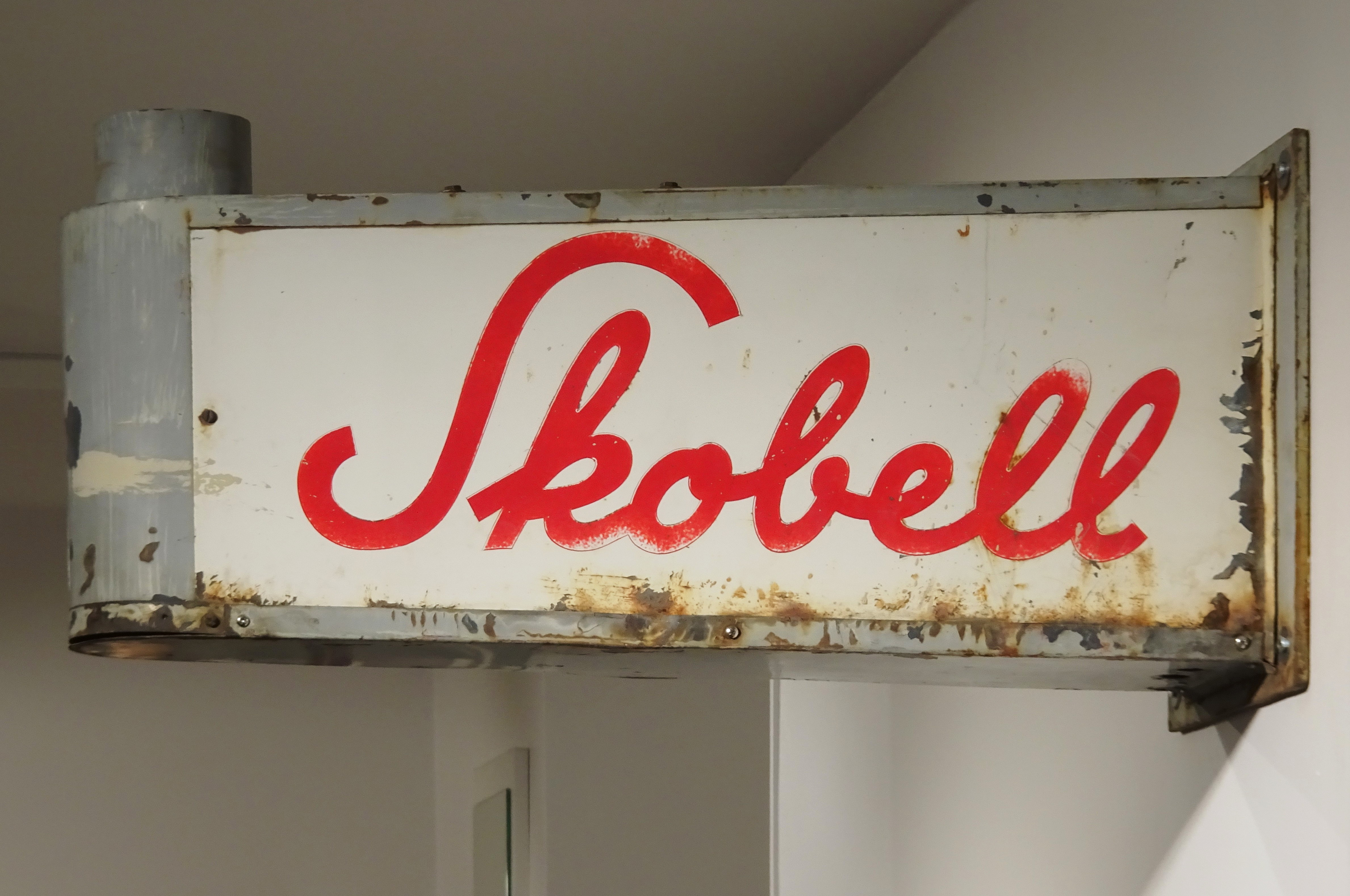 Skobell, Blekingegatan, Götgatan, äldre skylt